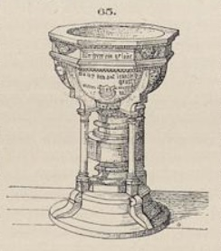 Zeichnung des Sendenhorster Taufstein von 1588 heute in der St. Laurentiuskirche in Westkirchen-Ennigerloh